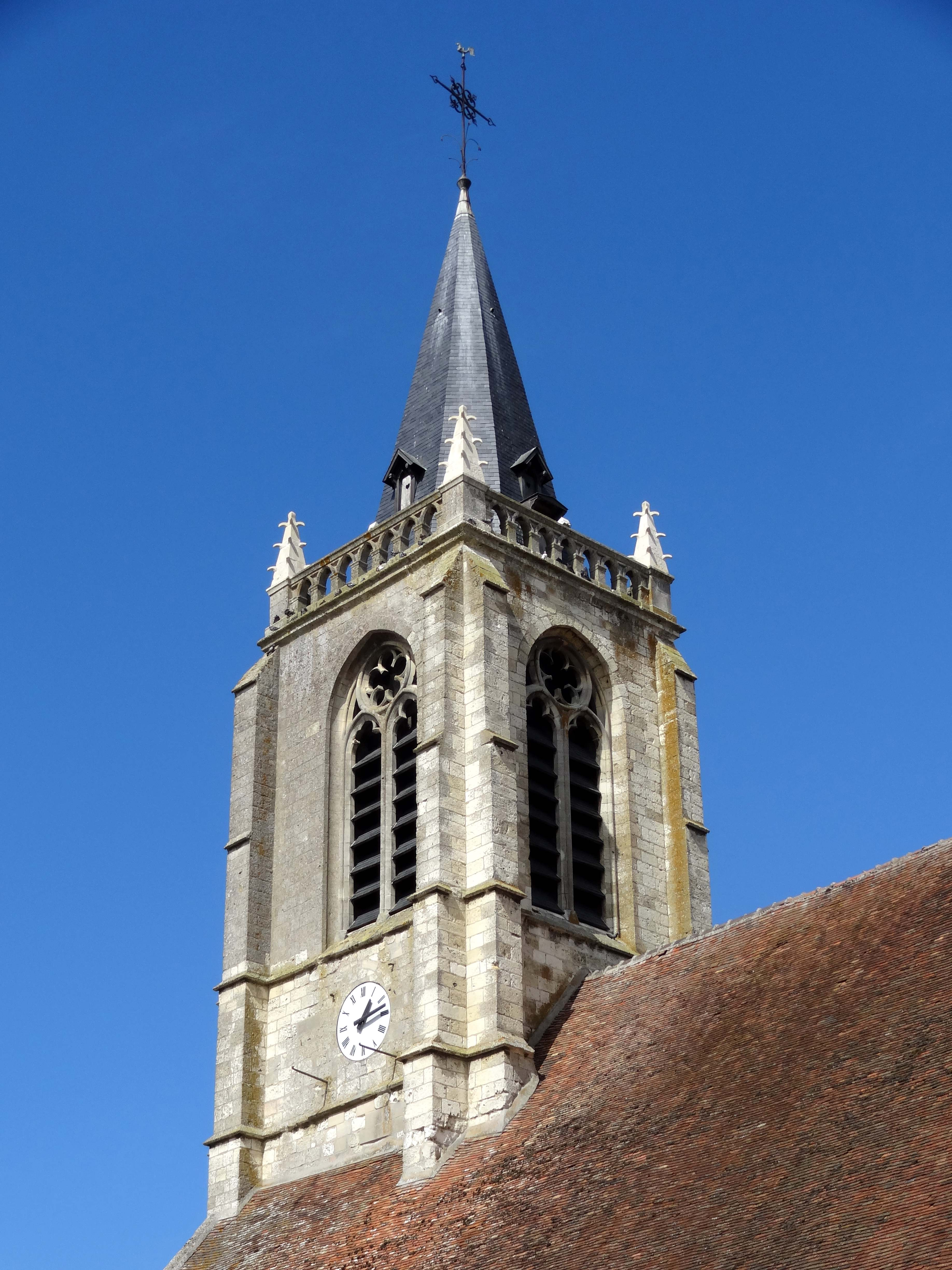 Église Saint-Denis de Remy - voir titre.